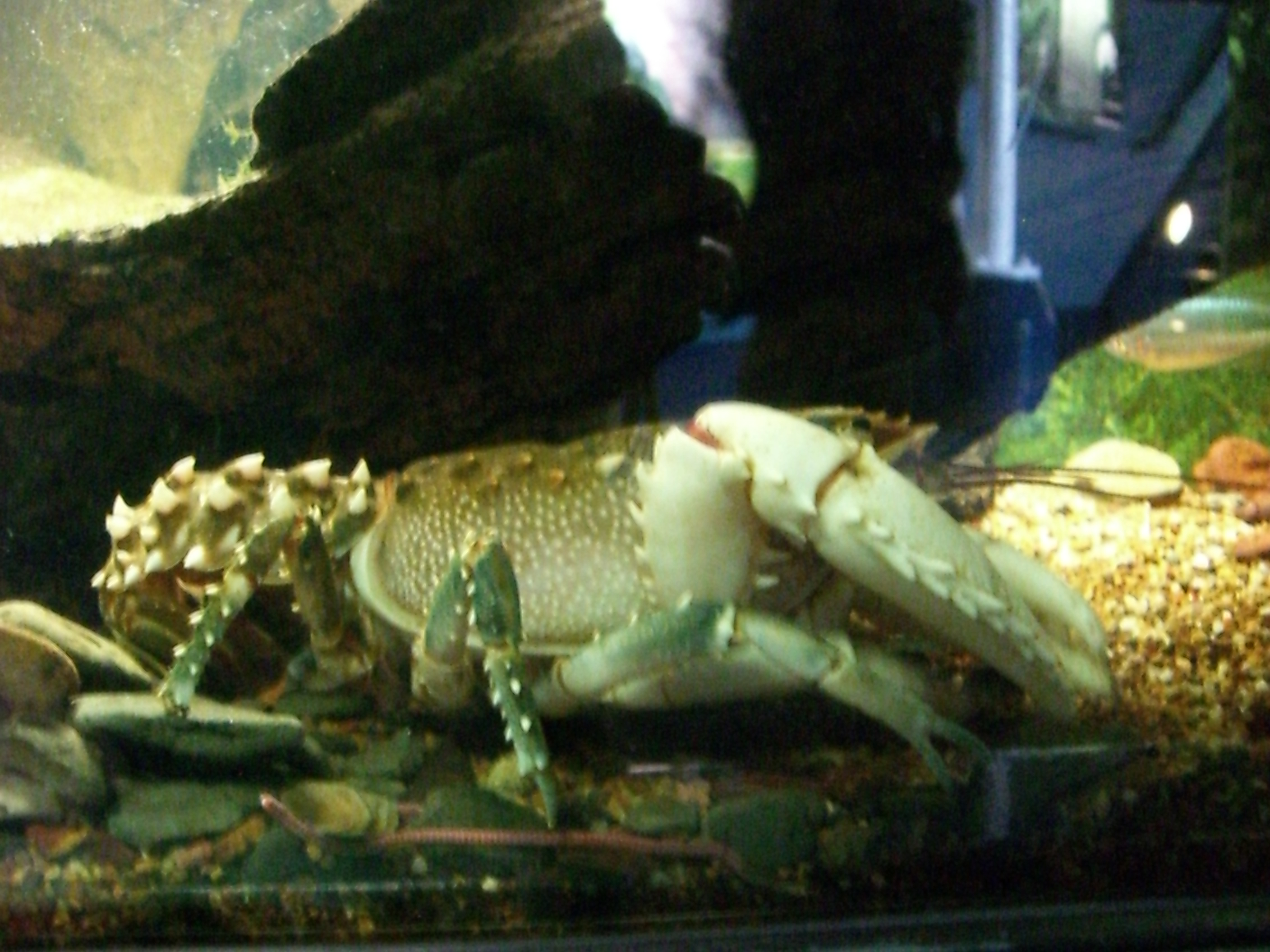 Euastacus armatus